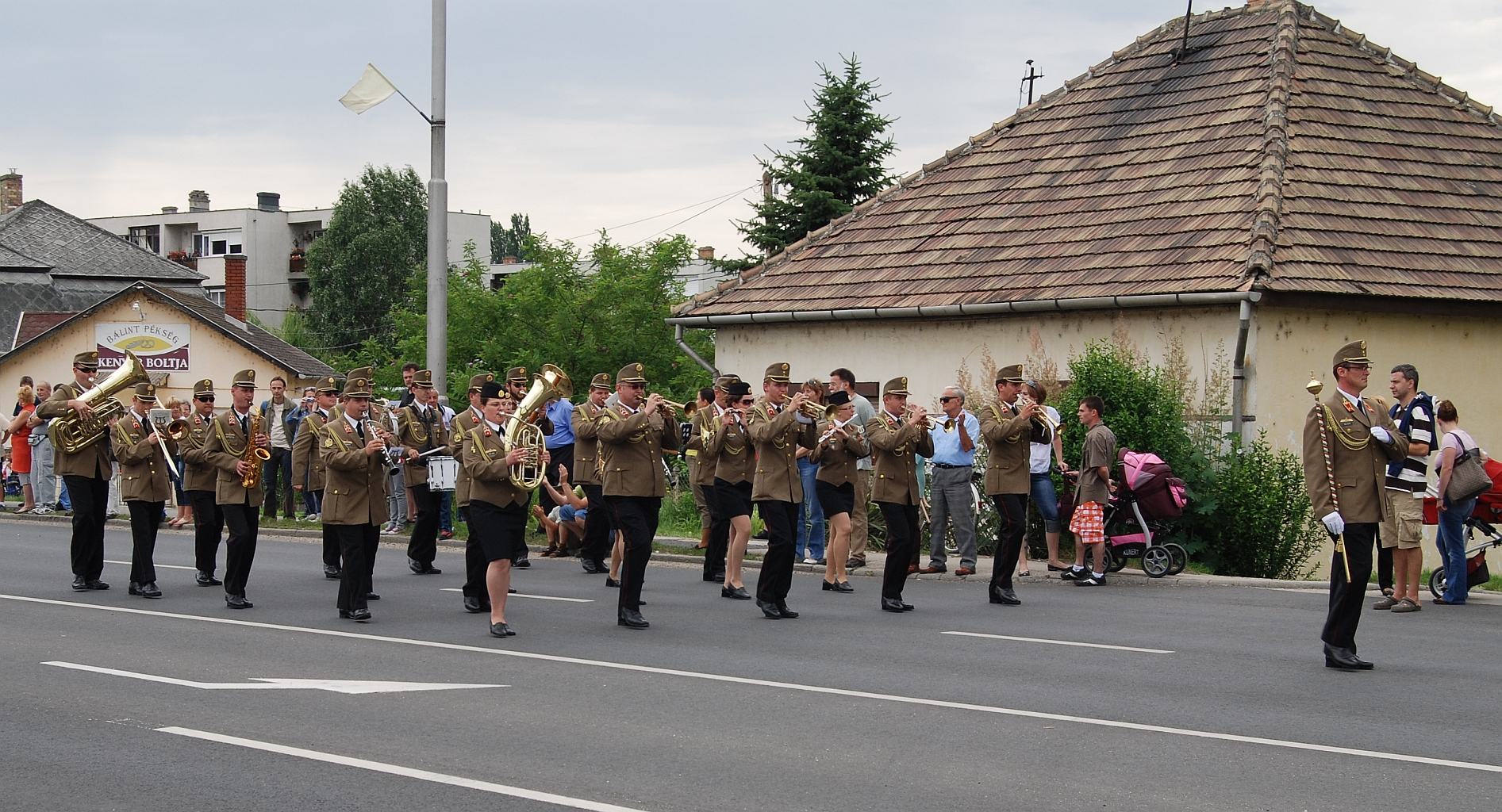 A MH 25. Klapka György Lövészdandár zenekara, a 2010-es Víz Zene Virág Fesztiválon keretein belül megtartott III. Regionális Katonazenekari fesztiválon, Tatán